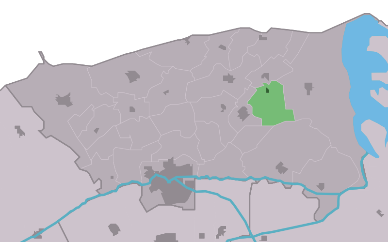 Kaartsje fan himrik fan Moarre